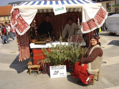 "Šarana jaja bojama grada", Osijek, 8. IV. 2006, najljepše uređeni štand, Društvo prijatelja baranjskih starina "Ižip", Topolje